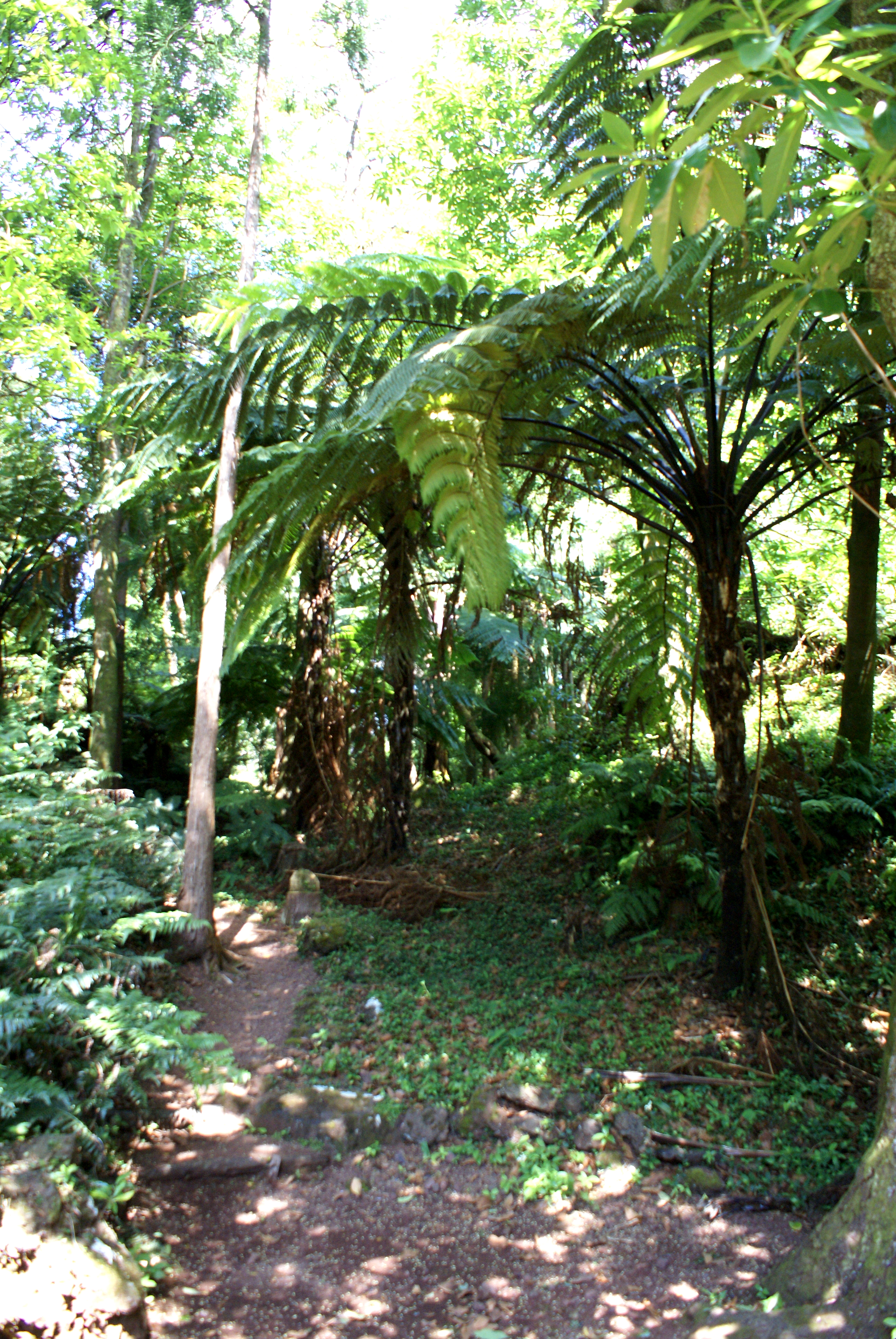 Pinhal da Paz, floresta de Fetos arbóreos, Ponta Delgada, ilha de São Miguel, Açores